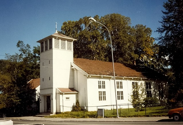 Landfalløya kapell